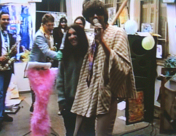 Ricardo Frantz ao microfone com a Banda Aristóteles de Ananias Jr, em performance simulando show de calouros na Casa de Cultura Mario Quintana, com participação do público e músicos convidados